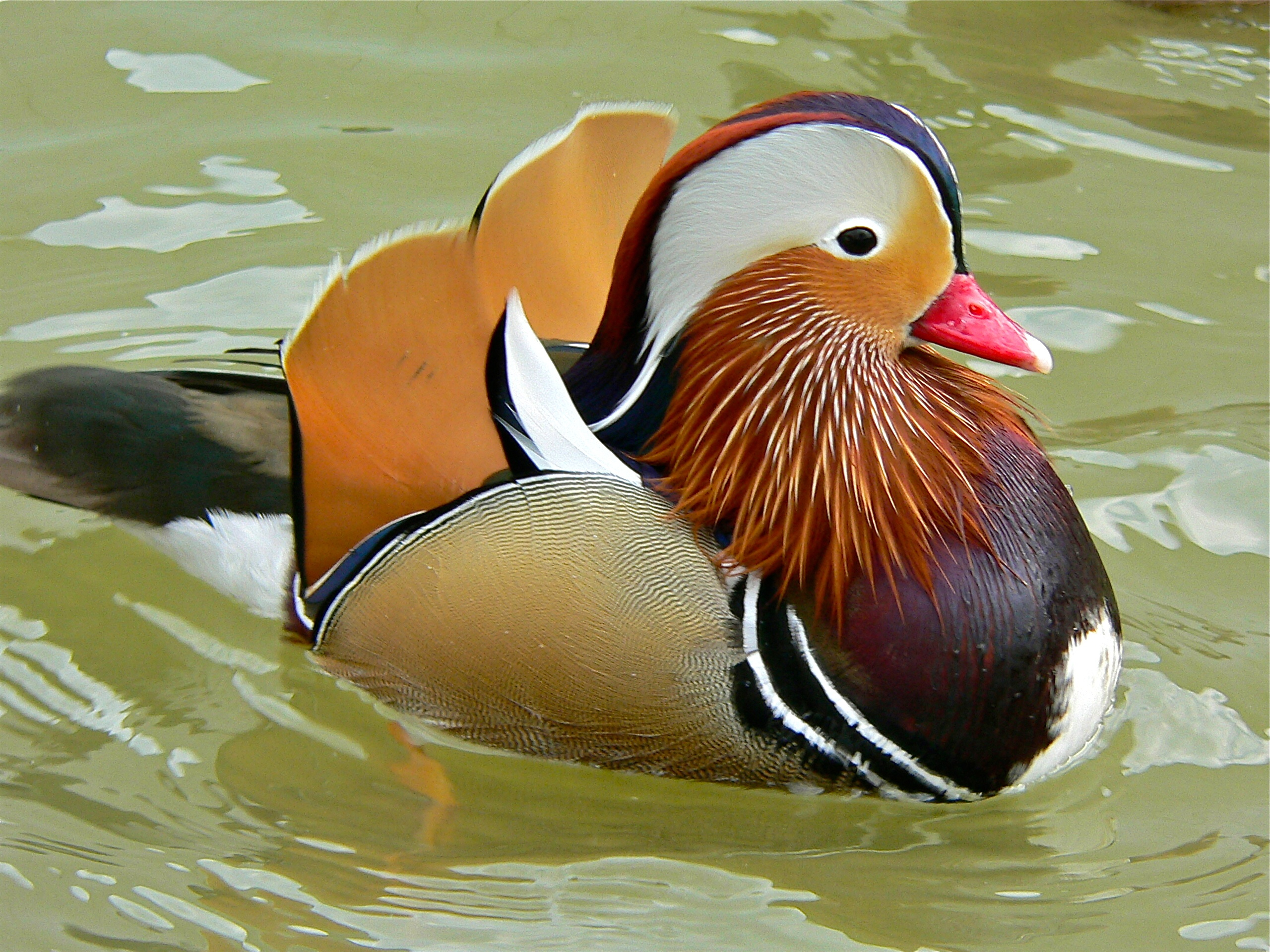 Parc Phoenix, Nice, Alpes-Maritimes, FRANCE